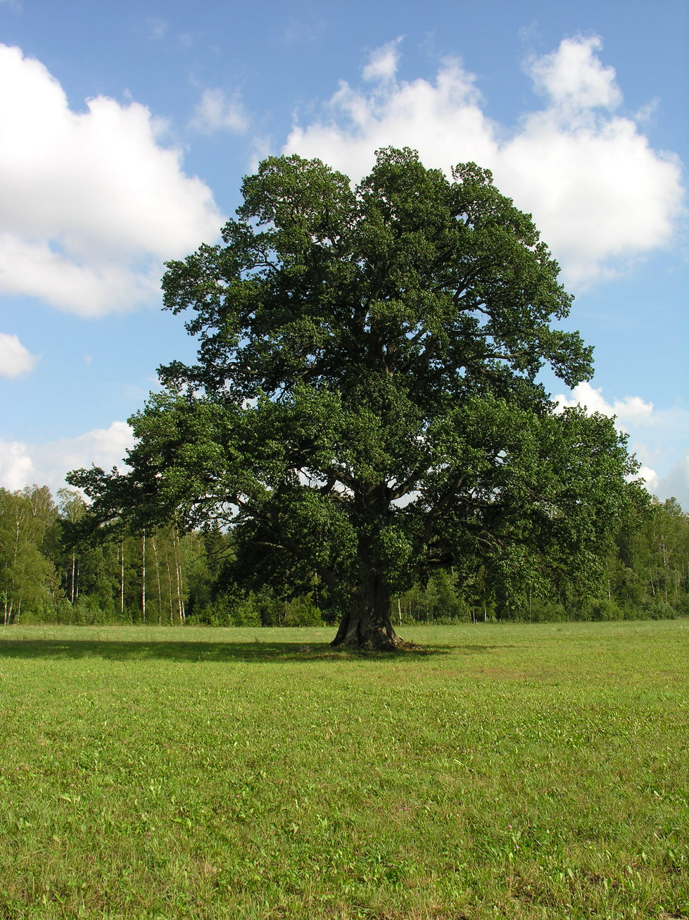 Žibikai, Mažeikių rajonas, Viekšnių seniūnija Žibikų ąžuolas - gamtos paminklas Foto: Algirdas, 2006 m. rugpjūčio 20 d., Lietuva